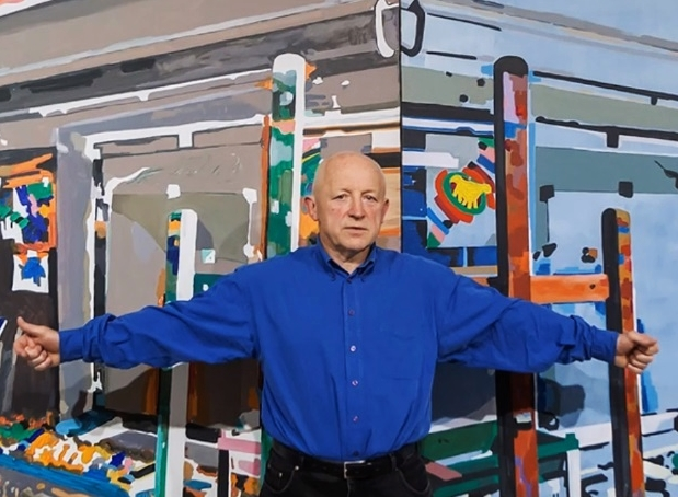 Ryszard Grzyb (ur. 1956), malarz, w Galerii Bielskiej BWA 25 maja 2016